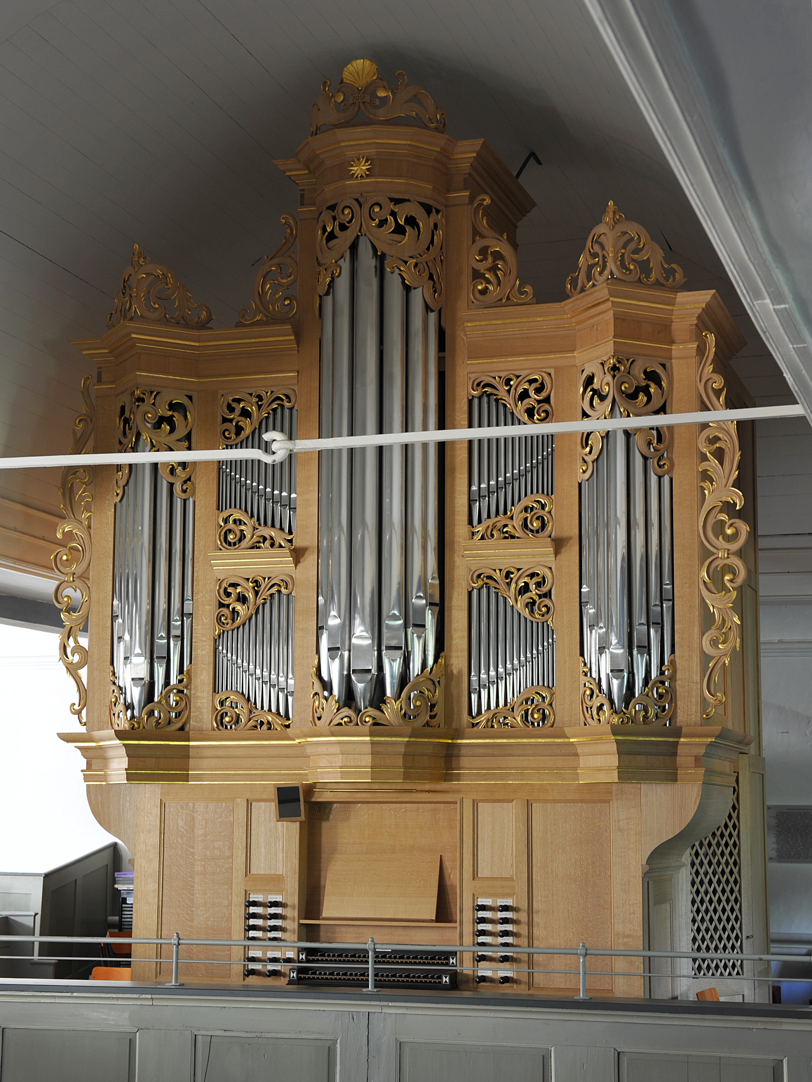 Ahrend-Orgel der Zionskirche in Worpswede, Niedersachsen